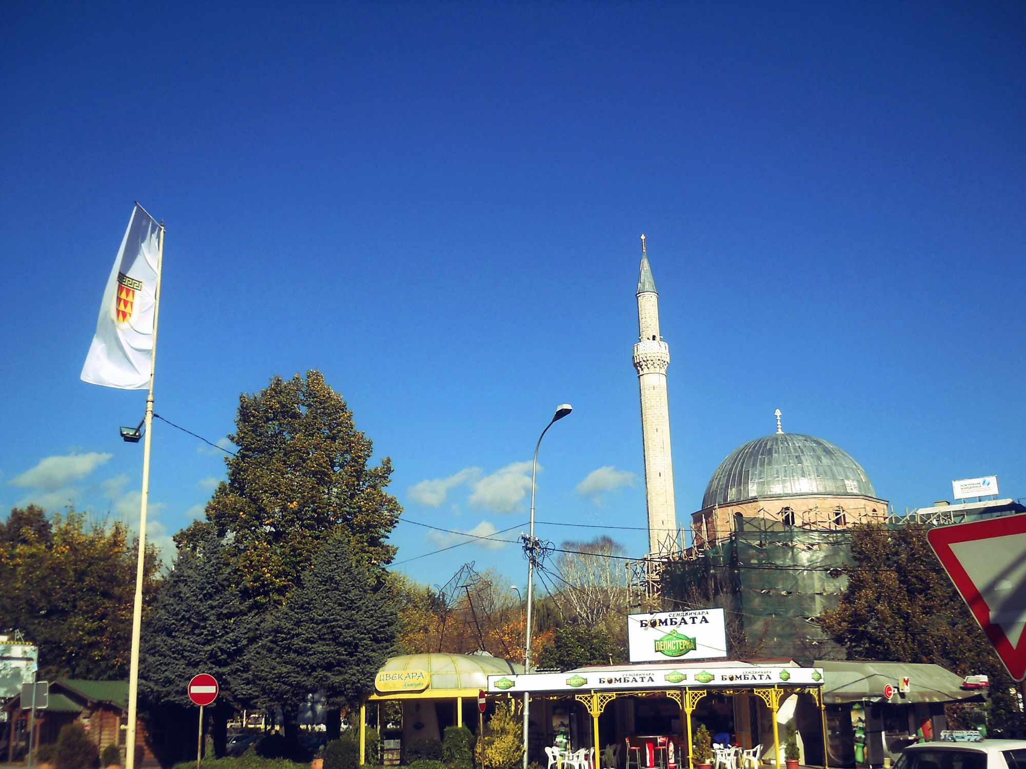 Џамија “Исхак Челеби” Битола